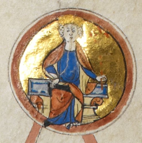 Miniature de Cnut le Grand dans une généalogie royale du XIIIe siècle.